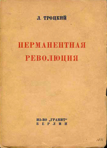 Троцкий - Перманентная революция (1930, обложка)